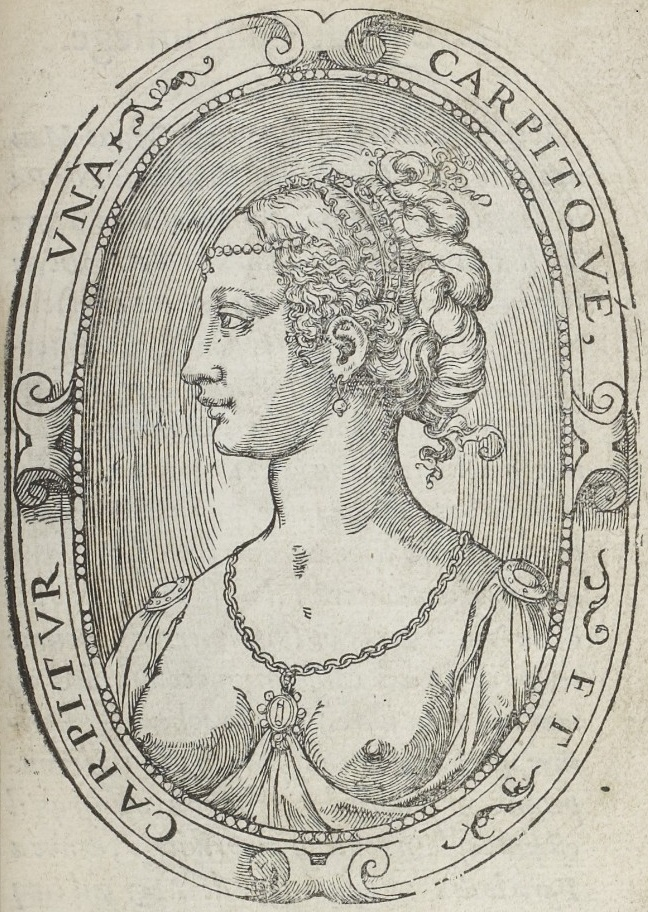 Gravure figurant en frontispice des premières éditions (ici celle de 1553) des Amours de Ronsard, en regard d'un portrait du poète à 27 ans.